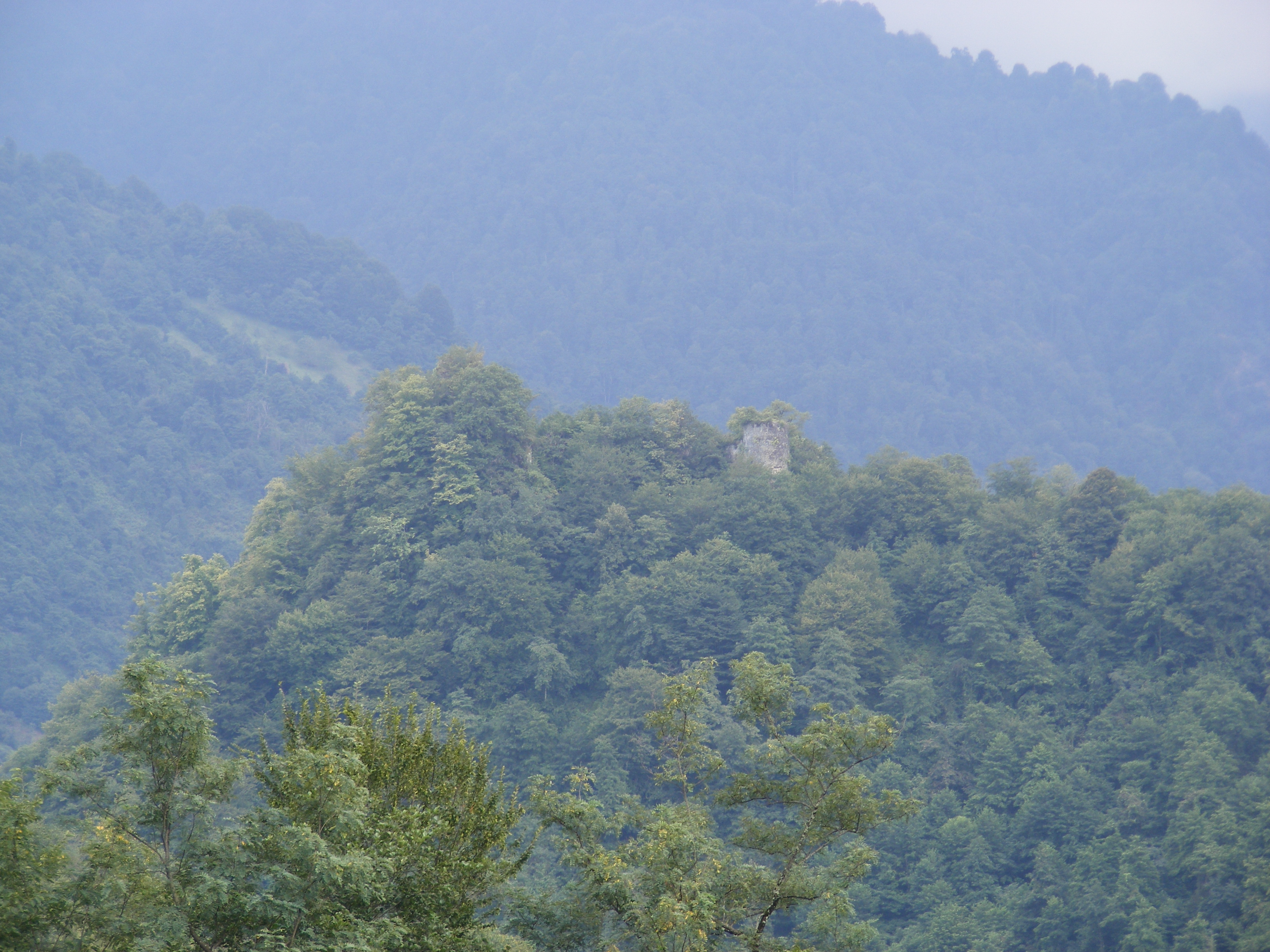 ასკანის ციხე, სოფელი მთისპირი, ოზურგეთის მუნიციპალიტეტი, გურია